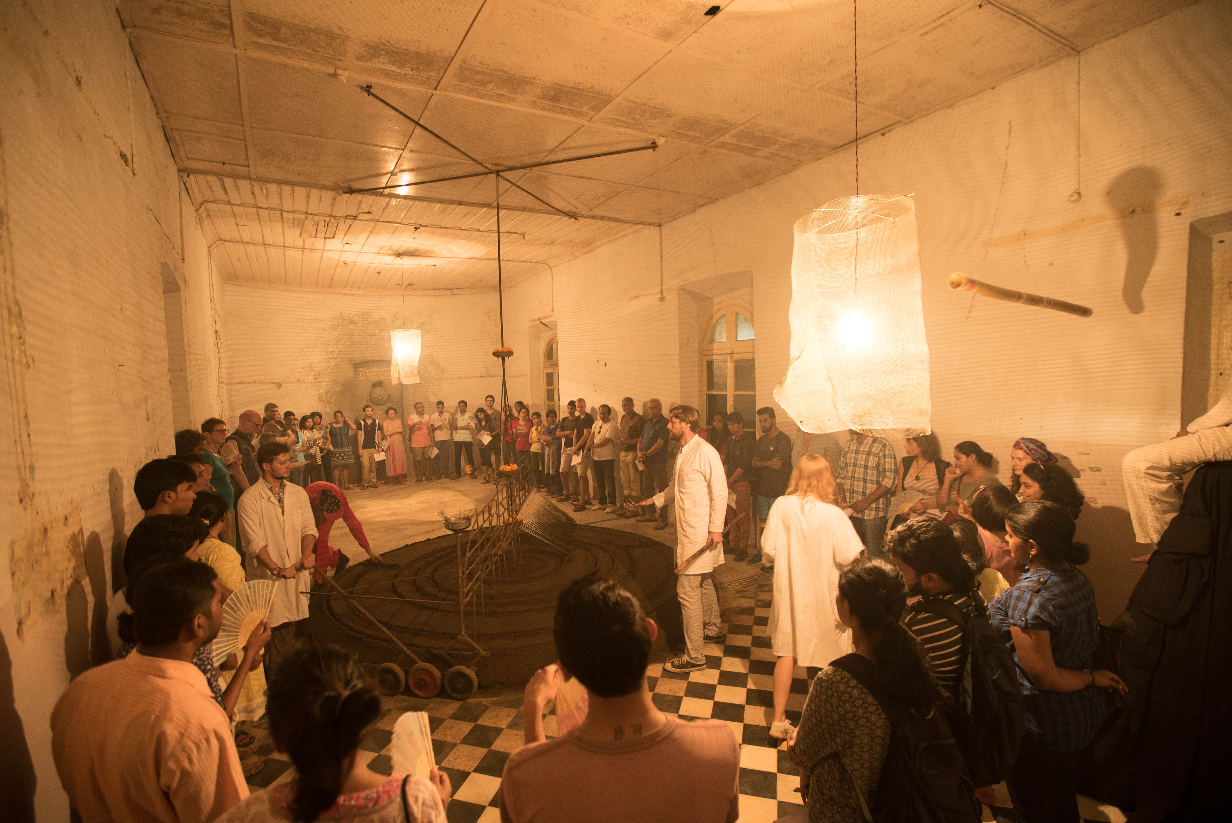 Widowisko "Ewolucja Gwiazd" Instytutu B61 podczas Festiwalu "The Story of Space" w Indiach